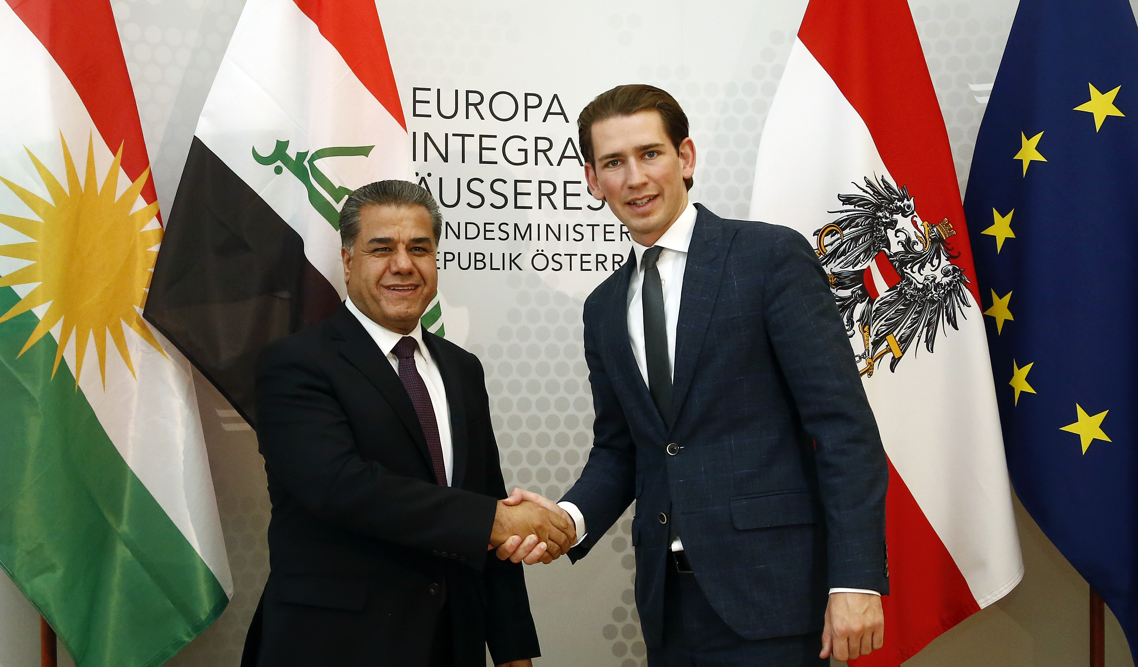 Bundesminister Sebastian Kurz trifft Falah Mustafa, Leiter der Abteilung für Auswärtige Angelegenheiten der Regionalregierung Kurdistan-Irak. Wien, 26.06.2015, Foto: Dragan Tatic